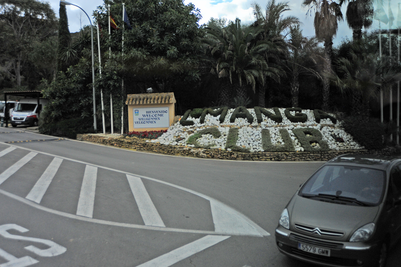 La Manga Club